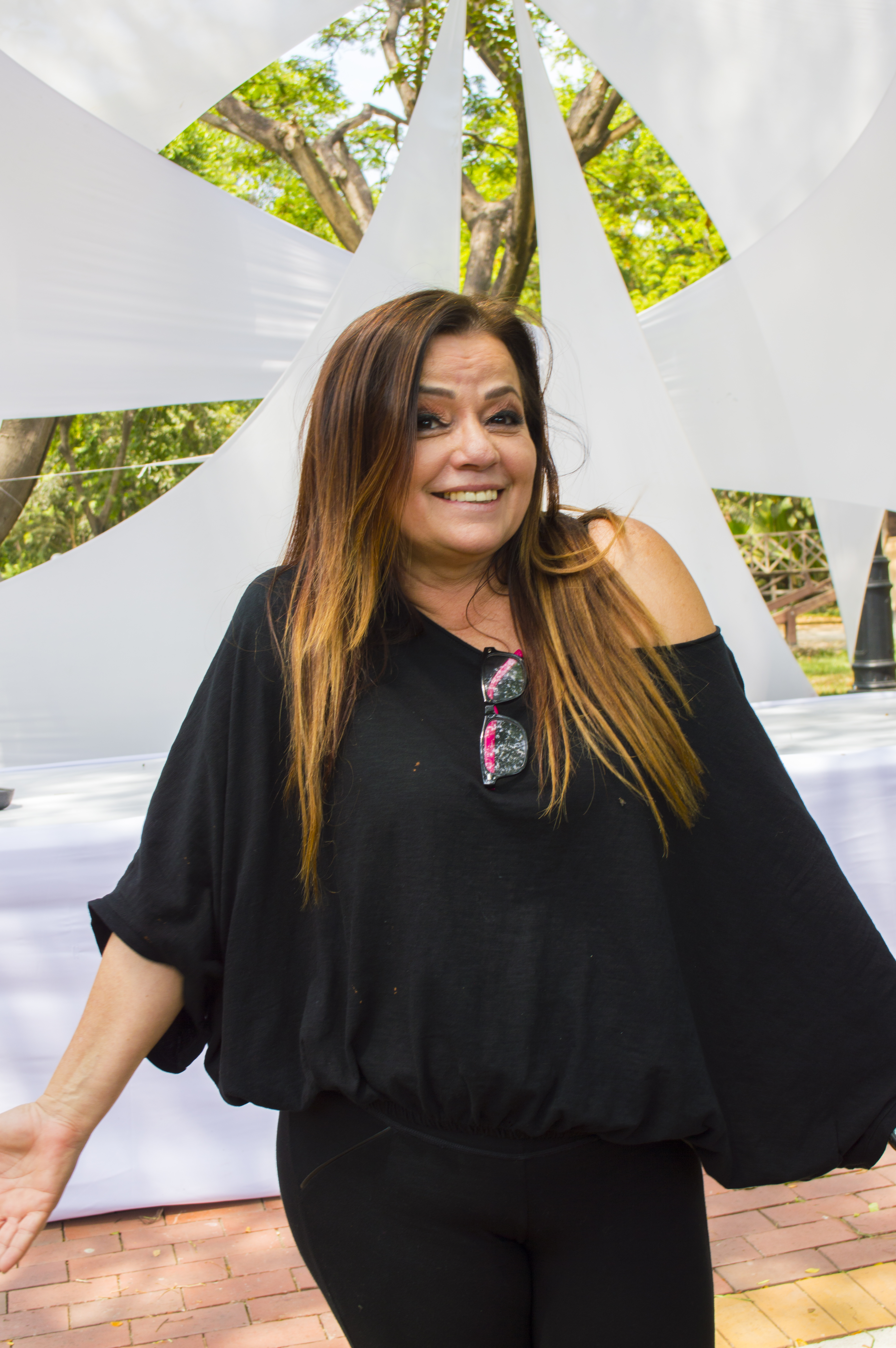 ESTA IMAGEN ES DE MI PROPIEDAD Y LA DEJO A DOMINIO PÚBLICO PARA QUE SEA USADA POR WIKIPEDIA Y QUIEN DESEE USARLA, ACLARO EN LA DESCRIPCIÓN DE LA MISMA PORQUE LAMENTABLEMENTE SE ME HA BORRADO GRAN PARTE DE MI TRABAJO SUBIDO EN ESTA PLATAFORMA PENSANDO QUE NO SOY YO QUIEN HACE LAS FOTOGRAFÍAS.